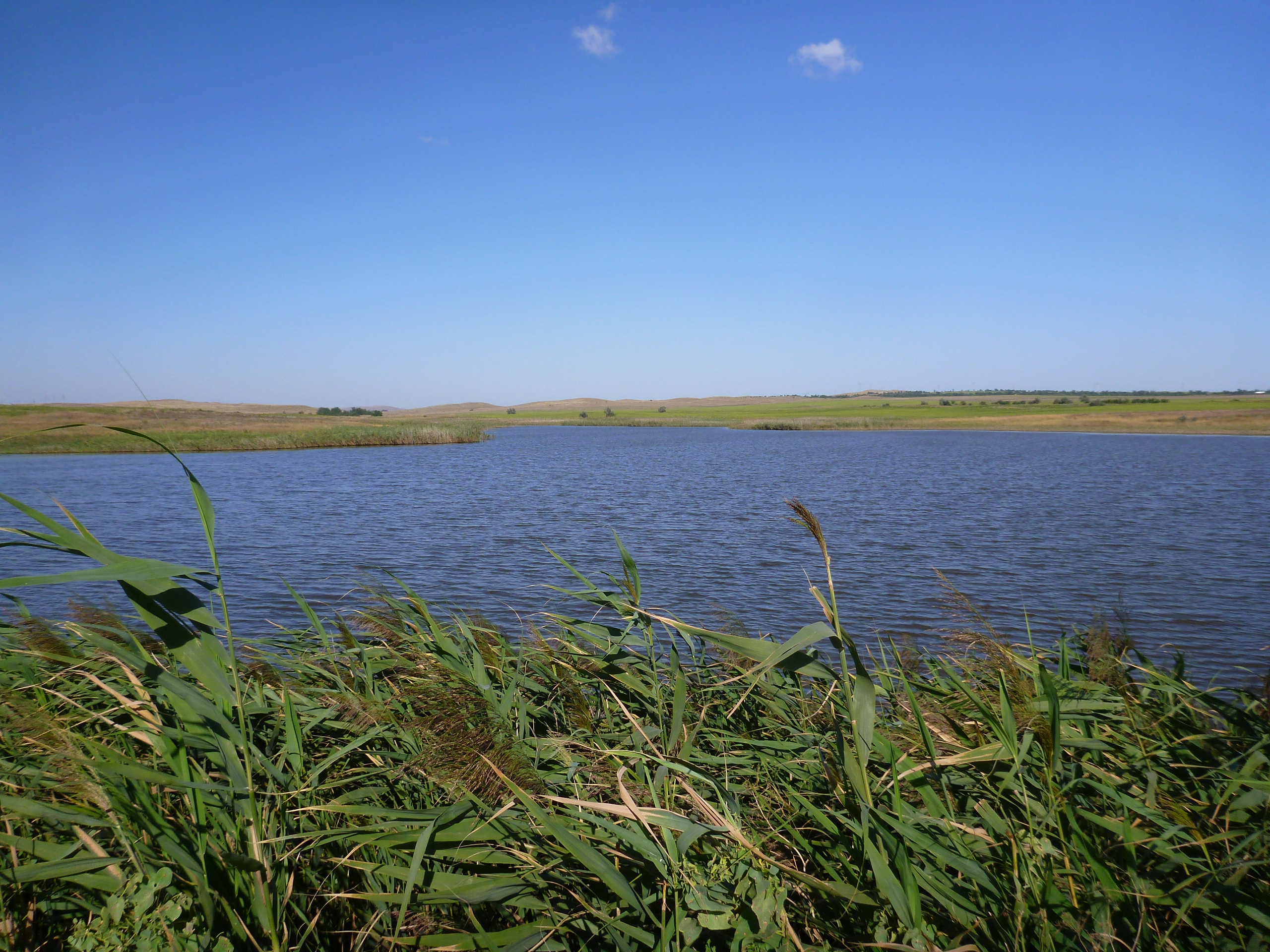 Михайловский пруд в Чурбашской балке. Крым.